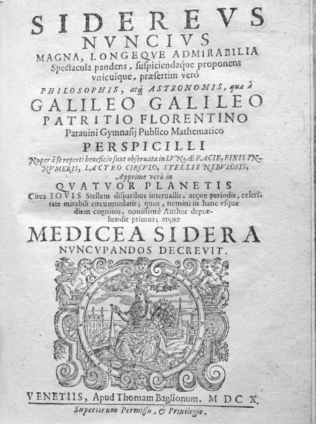 Galileo Galilei. Sidereus Nuncius. Venice, 1610